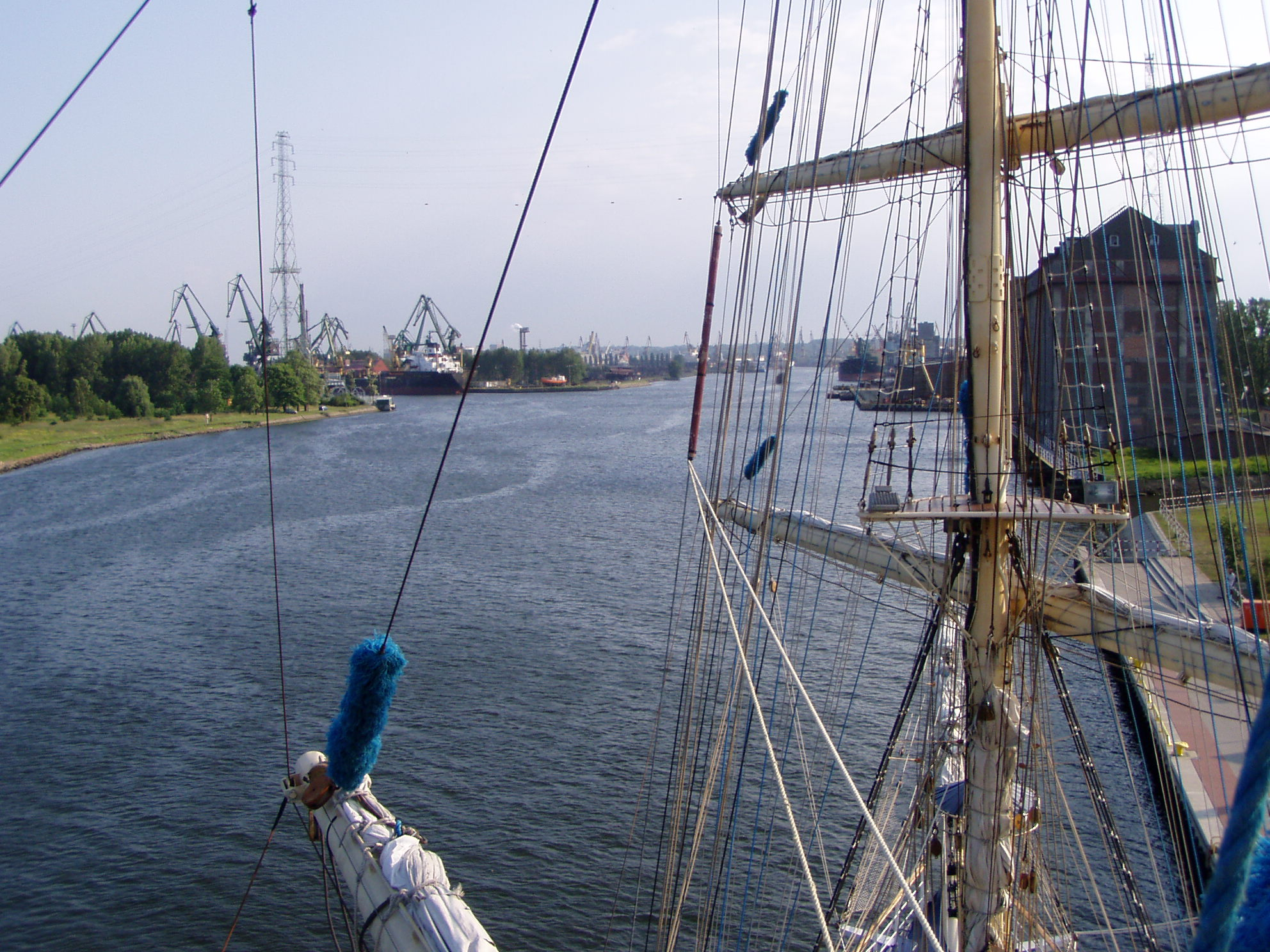 Widok na port w Gdańsku z grotmasztu żaglowca Fryderyk Chopin. Po lewej Nabrzeże Rudowe i Nabrzeże Dworzec Drzewny (Przeróbka). Po prawej elewatory zbożowe na Nabrzeżu Wiślanym (Letnica).